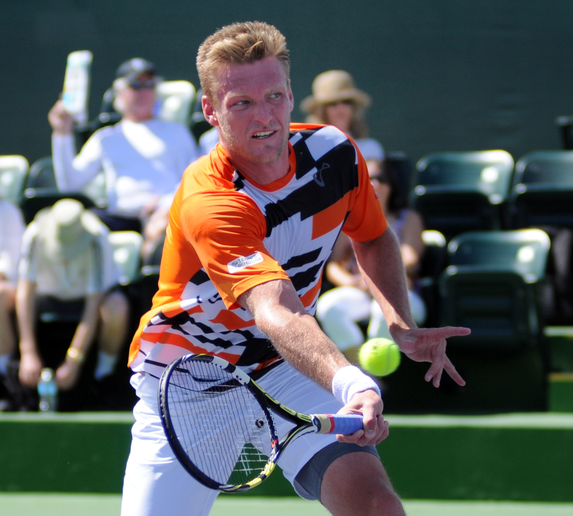 2014 BNP Paribas Open